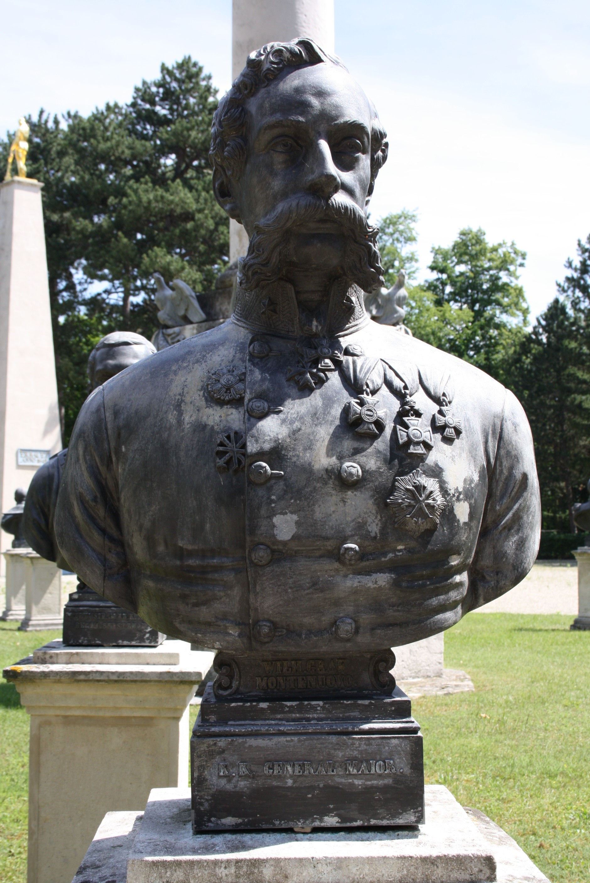 Büste in der Gedenkstätte Heldenberg (Niederösterreich)